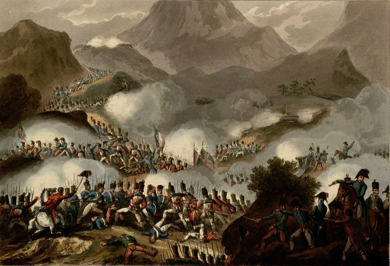 Fait partie d'un volume de gravures sur cuivre par T. Sutherland et D. Havell réhaussées à l'aquarelle. Titre gravé illustré en n. et b. Chaque gravure est suivie d'un texte explicatif. + in fine : "Contents", and "Names of Subscribers to the Martial Achievements of Great Britain and her allies". Ancely, René (1876 - 1966). Possesseur